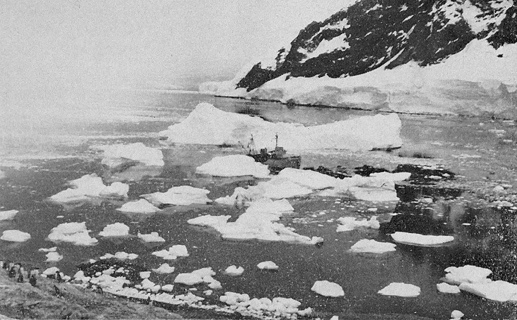 ARA Chiriguano cerca de la base Esperanza